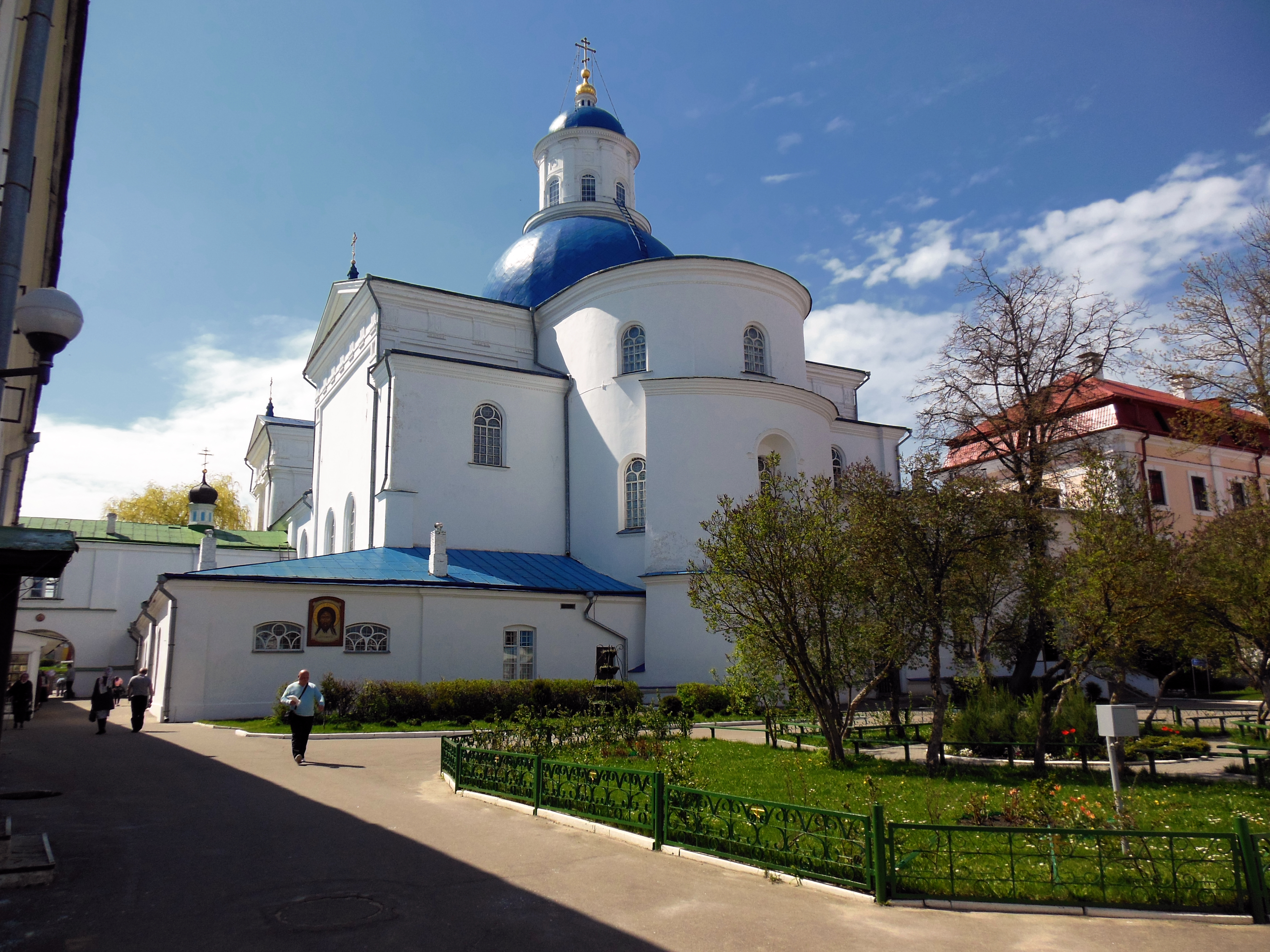 Беларуская (тарашкевіца): Ансамбаль Сьвята-Усьпенскага манастыра: Усьпенскі сабор дэкаратыўнае аздабленьне: росьпіс у консе «Спас Пантакратар», арнамэнтальны дэкор на скляпеньнях паўднёвай сакрысьціі і ўсіх нэфаў, іканастас, бакавыя алтары Богаяўленская царква Крыжаўзьвіжанская царква званіца будынак сэмінарыі жылы корпус гаспадарчыя пабудовы. в. Жыровічы This is a photo of Belarusian heritage monument. Reference number: 411Г000537 ( WLM)